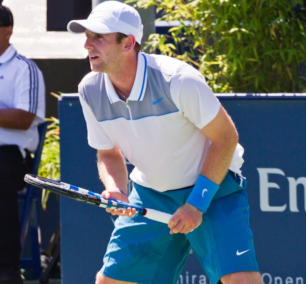 Jesse Levine in 2012